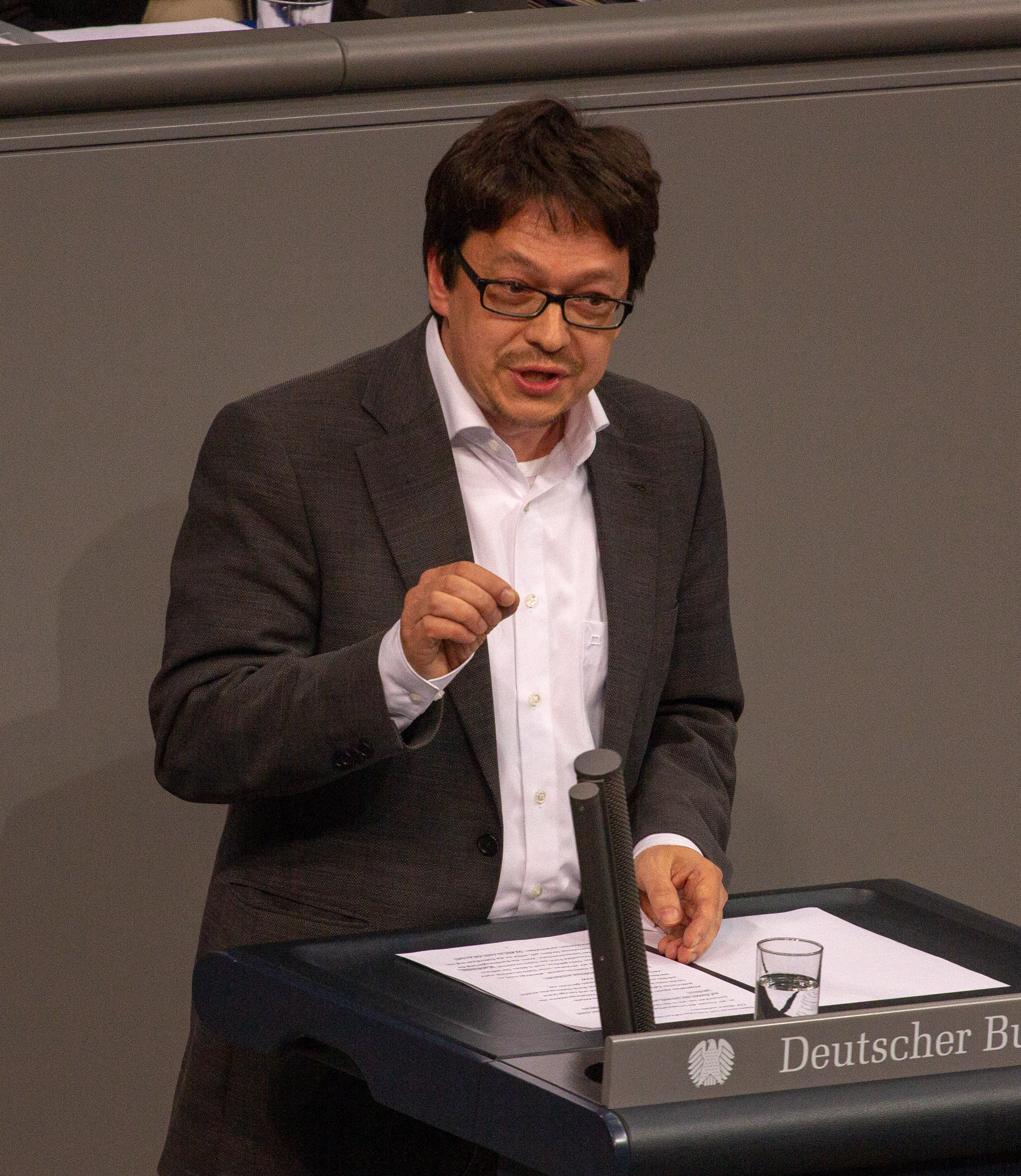 Andreas Wagner, Mitglied des Deutschen Bundestages, während einer Plenarsitzung am 11. April 2019 in Berlin.